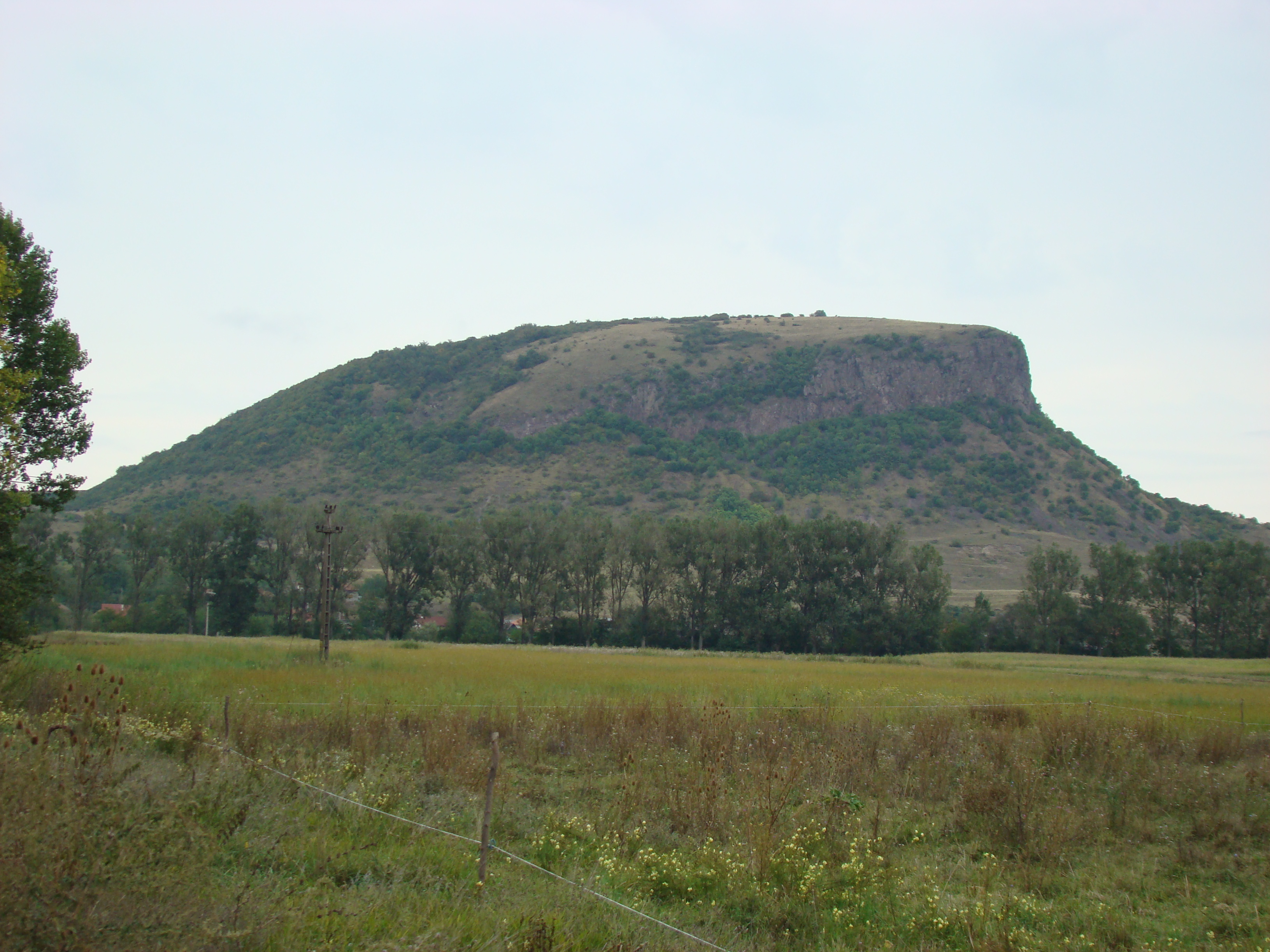 Măgura Uroiului din Uroi-Hunedoara